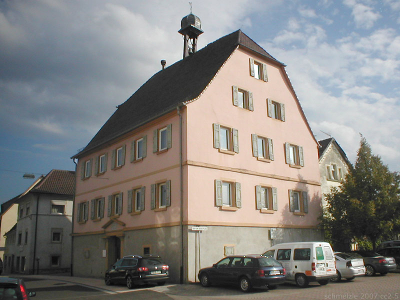 Rathaus in Meckesheim, Baden-Württemberg, Deutschland